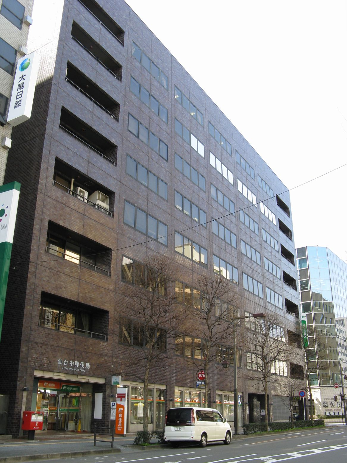 仙台中郵便局 2008年4月4日 Bakkai撮影